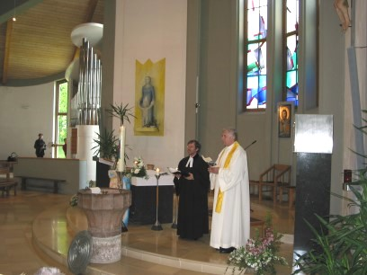 Ökumene wird praktiziert; evangel. Pastor und kath. Priester im Hellerhof Paudorf bei einer Tauffeier Sonstiges: ...